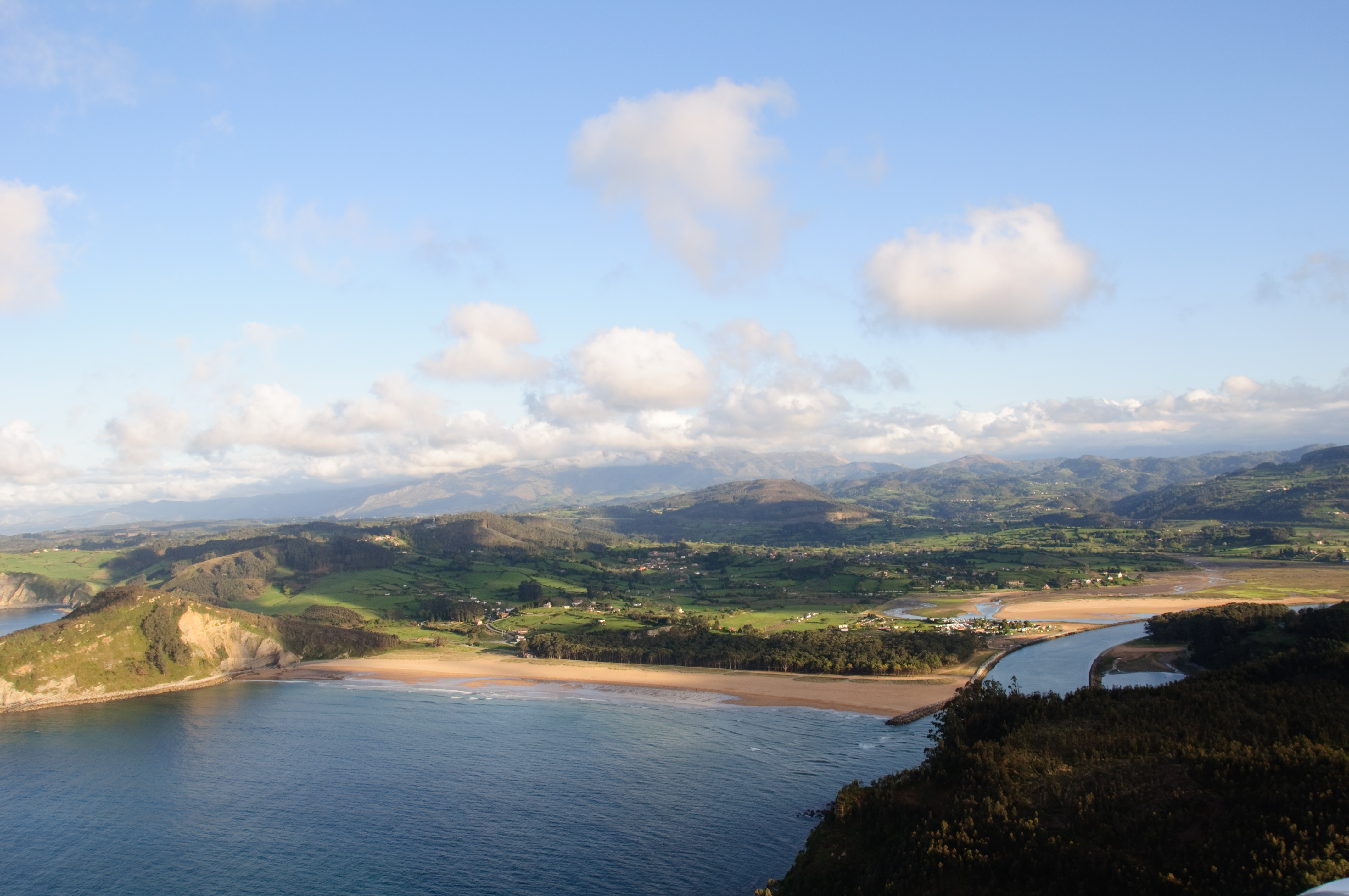 Vista aérea de la parroquia de Selorio (Villaviciosa) en Asturias (España). En primer término, la playa de Rodiles. A su derecha la ría de Villaviciosa.